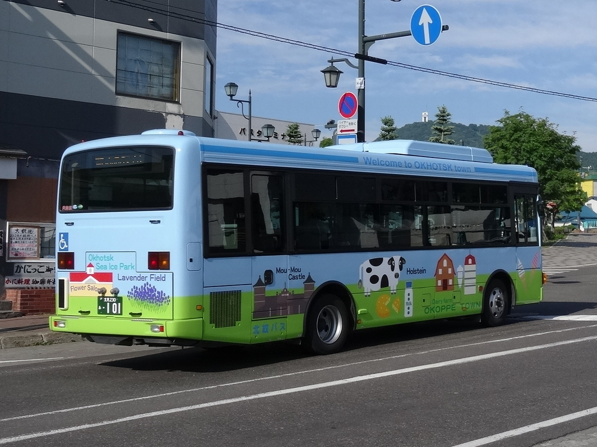 Monbetsu to Ōmu